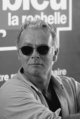 L'Humoriste et Acteur Franck Dubosc au Festival de la Fisction TV à La Rochelle en 2016